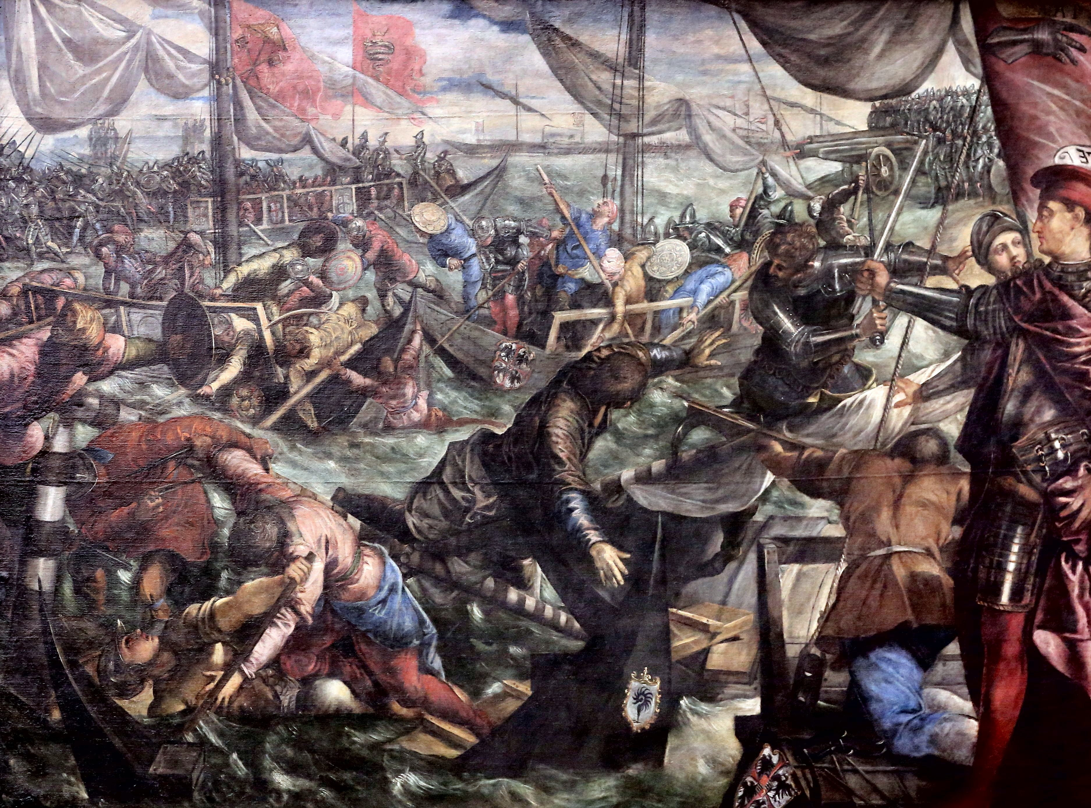 Ludovico II Gonzaga sconfigge i veneziani nella battaglia dell'Adige - Olio su tela, cm. 273 × 385.5